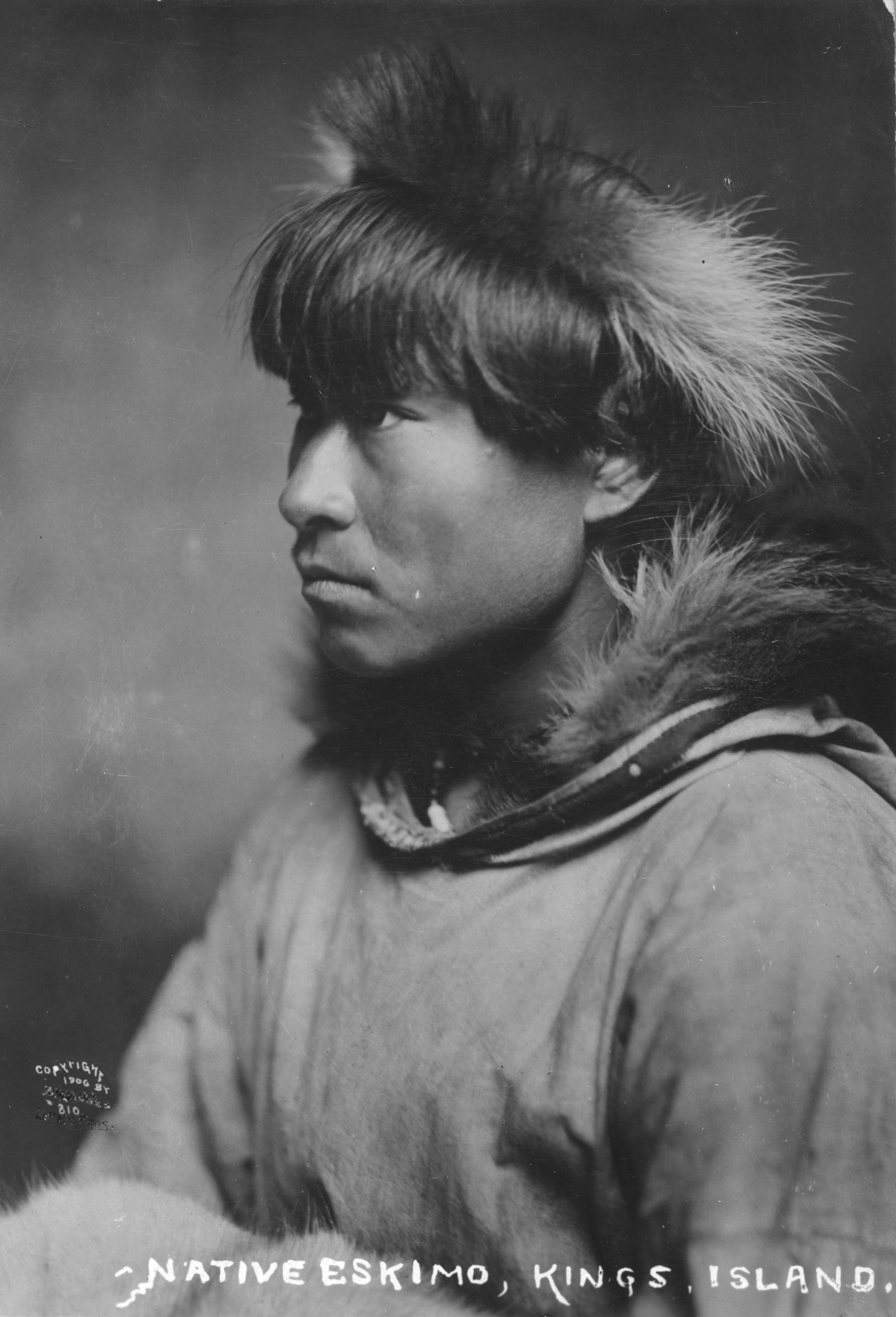 Kings Island [i.e. King Island, or Ukivok] - Native Eskimo